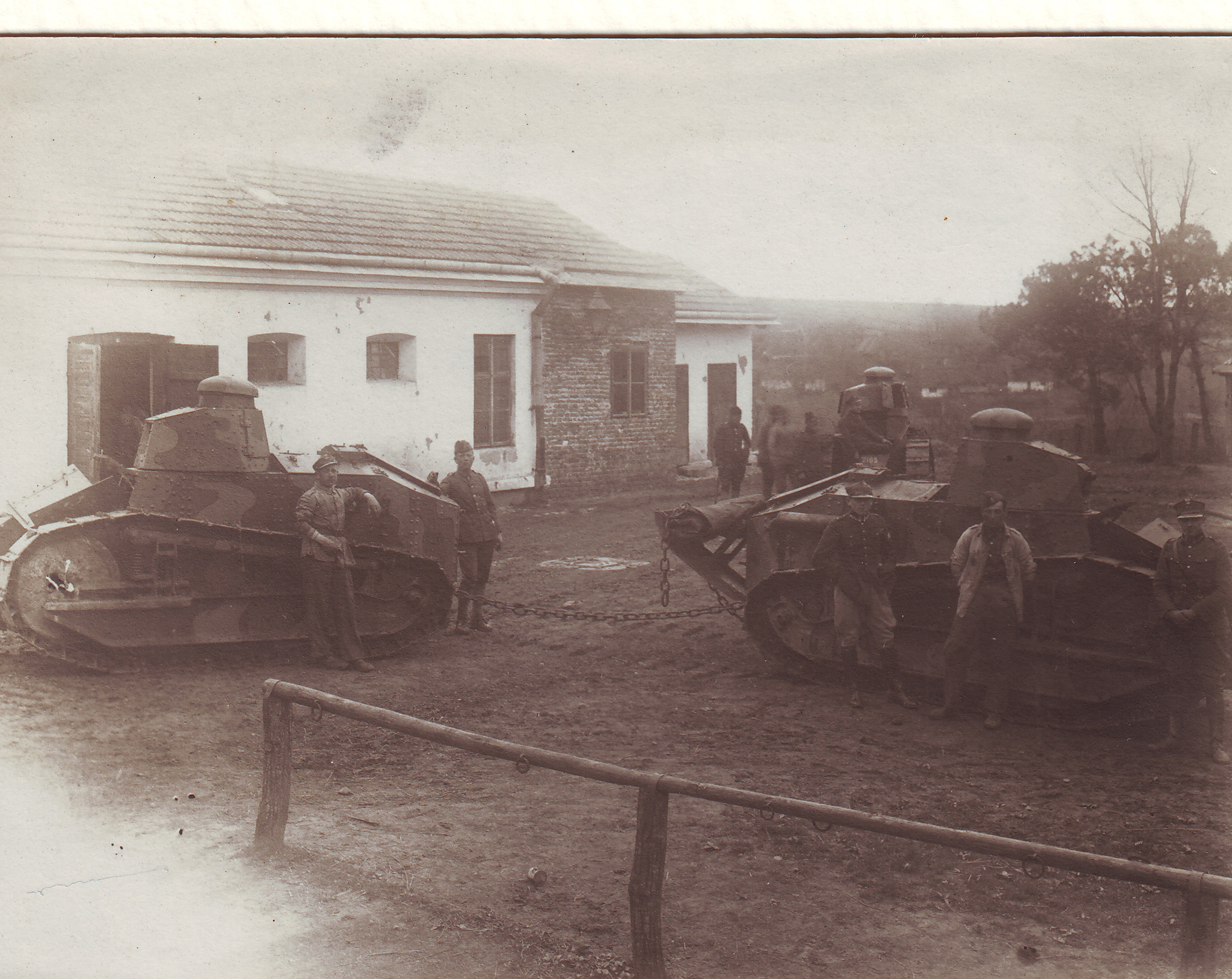 Brunon Błędzki, przy czołgu (po prawej stronie), Żurawica, 1925